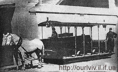 Кінний трамвай (Львів)